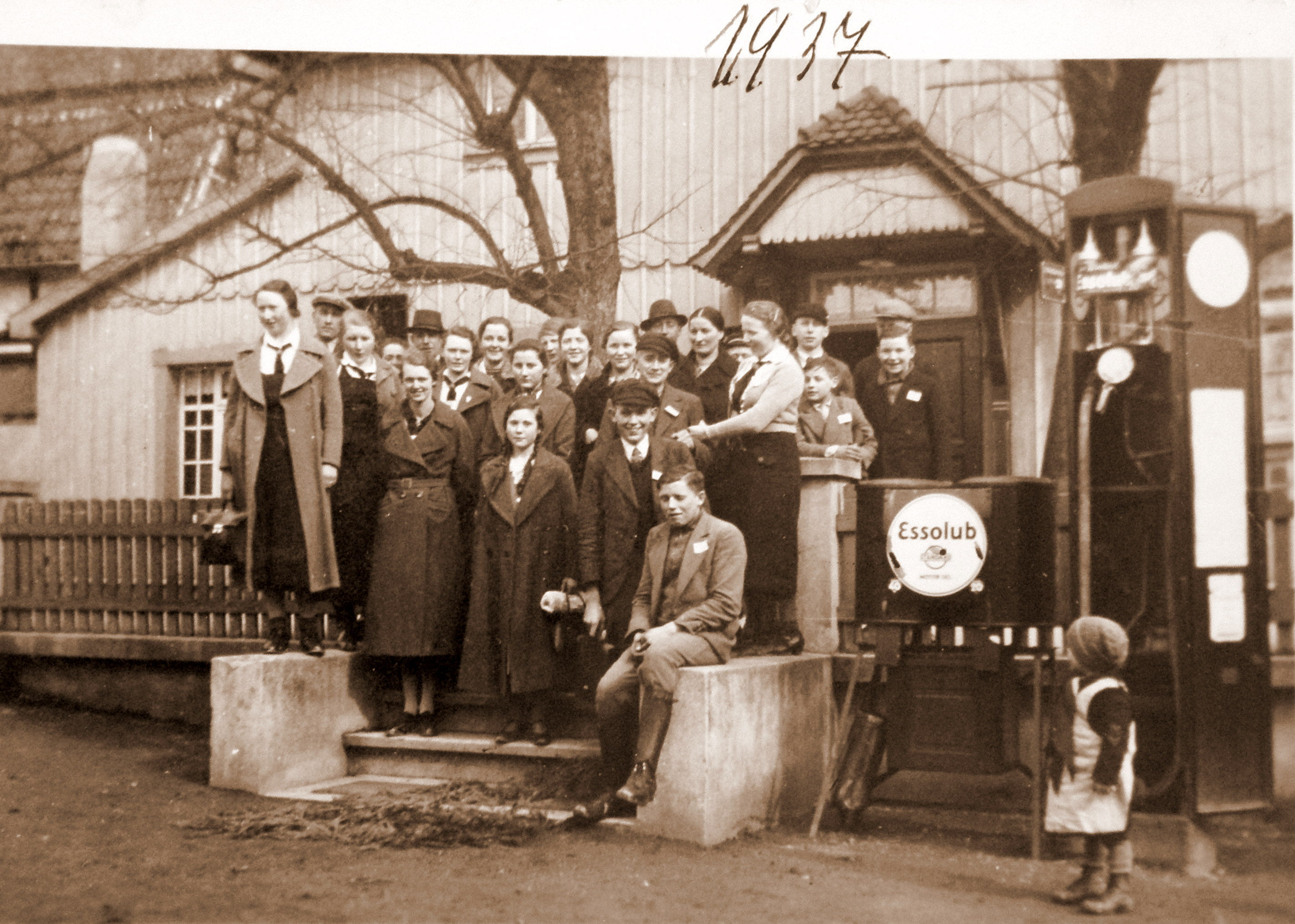 Diese Aufnahme entstand 1937 in Woffleben am Gasthaus "Schenke" (Name zu DDR-Zeiten "Zur Linde"). Ein Liter Benzin kostete damals 25 Reichspfennige. Die Tankstelle verkauft auch "Essolub Standard Motor Oil".